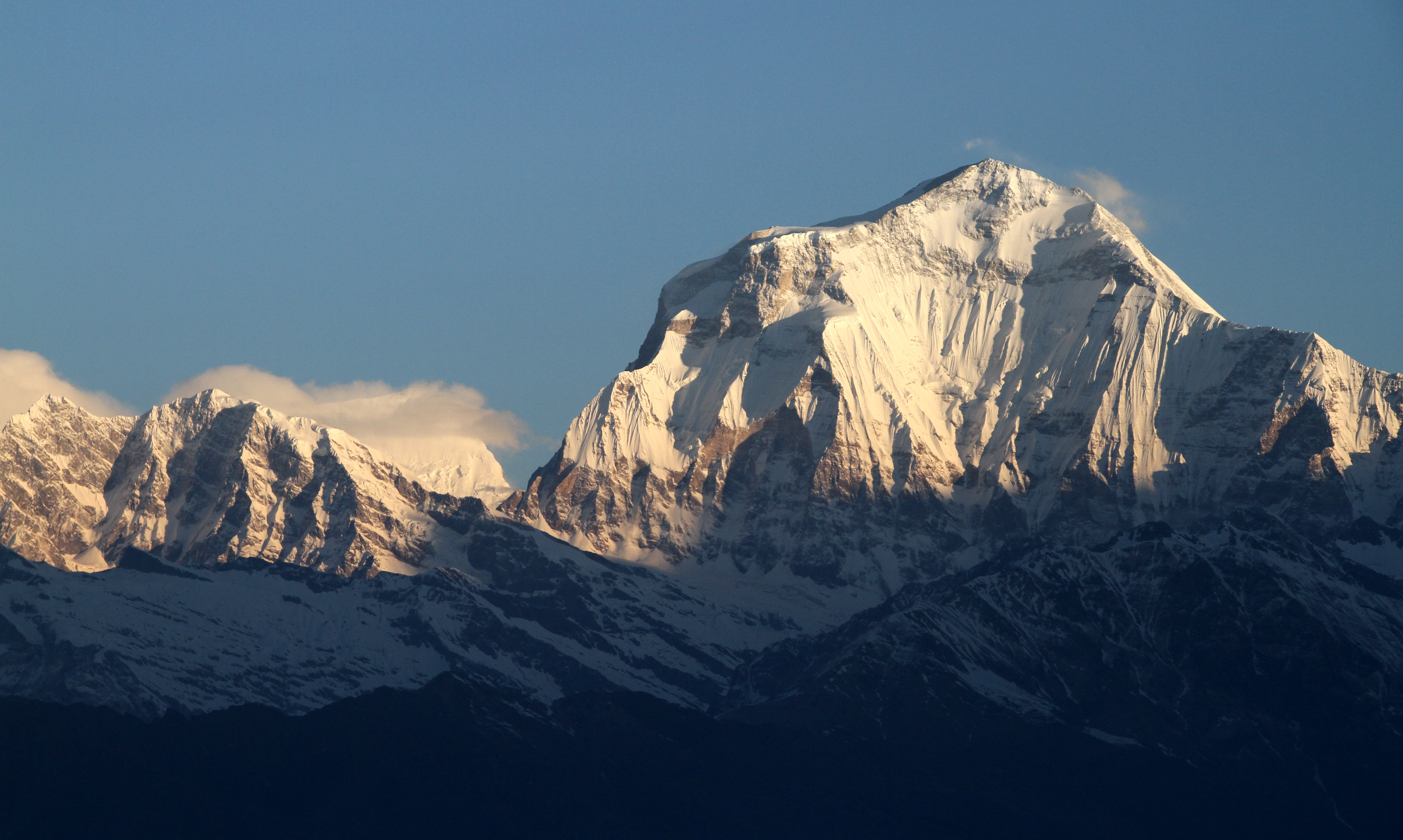 Poon Hill in Nepal